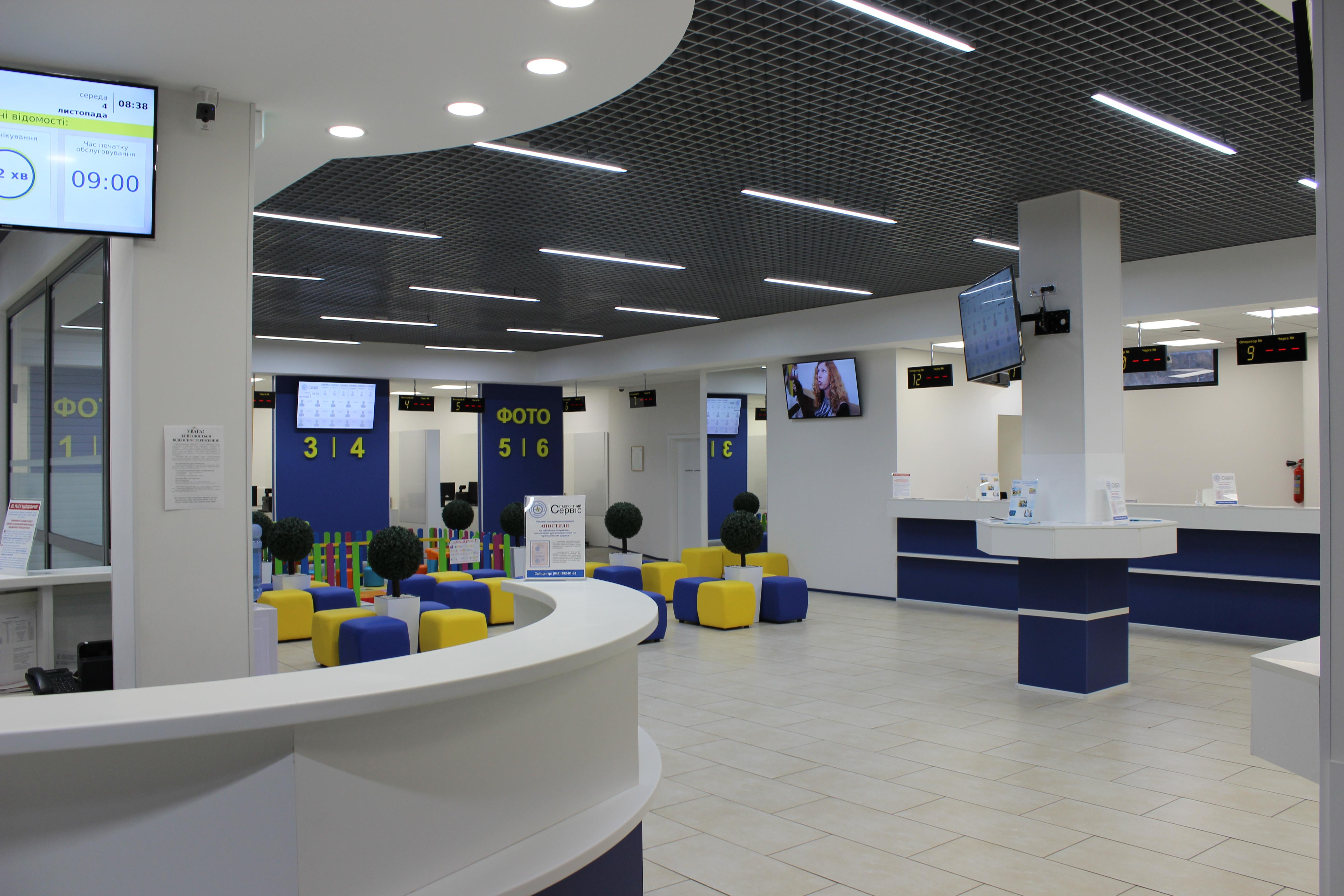 Державне підприємство «Документ»